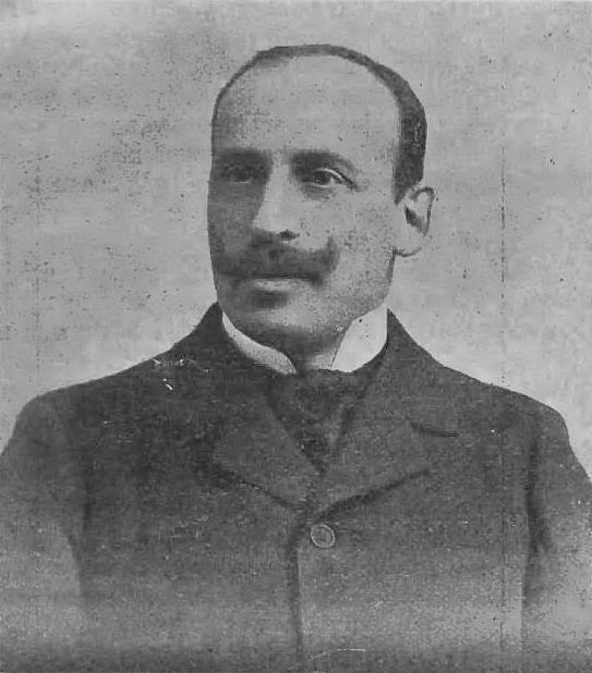 Władysław Buchner (-1906)